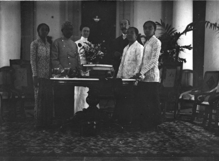 Foto. Groepsfoto met regent R. M. A. Ario Adiningrat en familie, Netty en M. Treub te Demak, Midden-Java